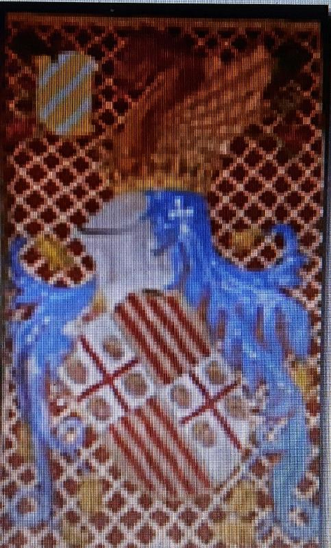 Drappo della famiglia Suriano